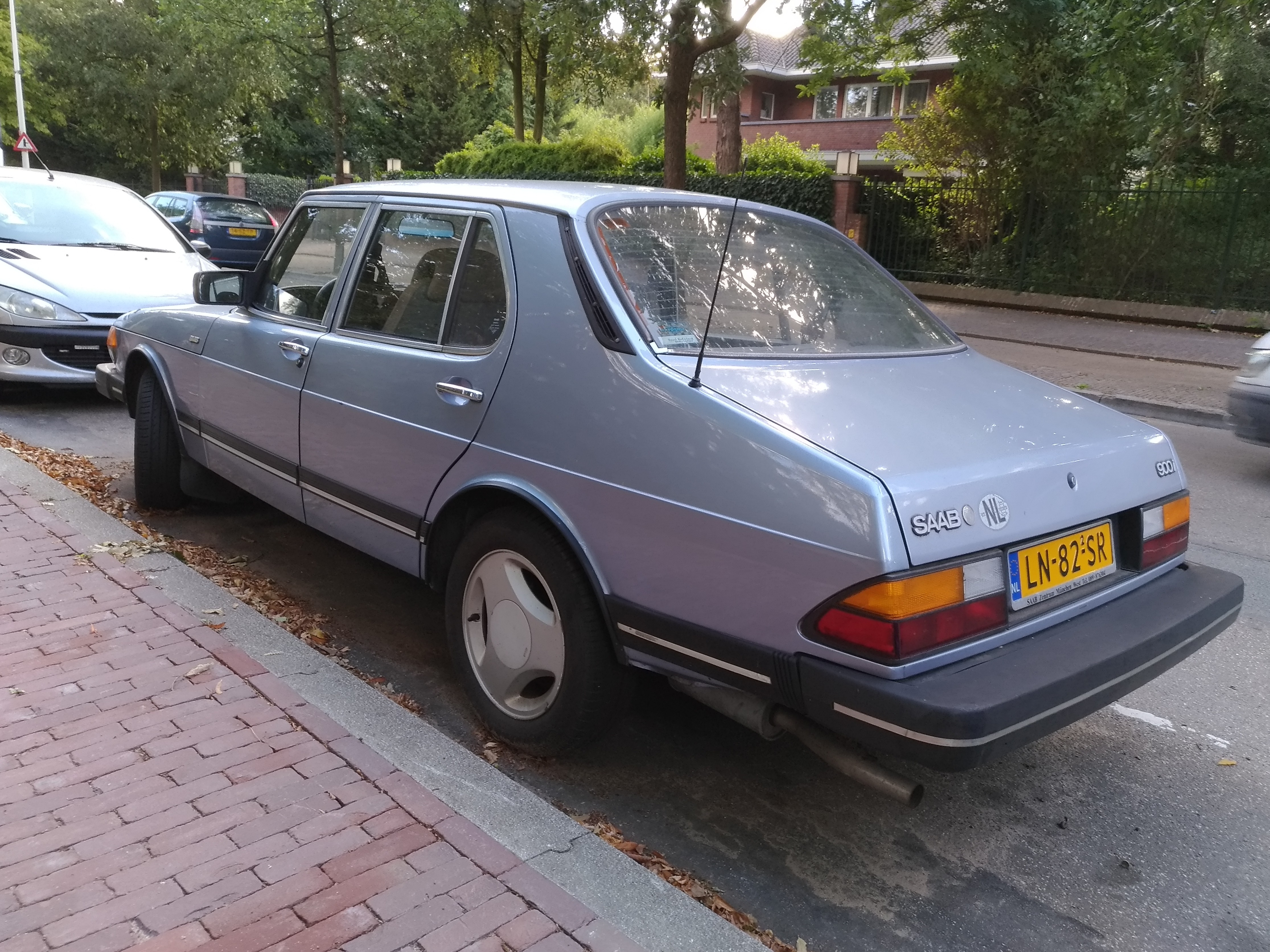 1984 Saab 900i Sedan (2.0 118 hp) at The Hague